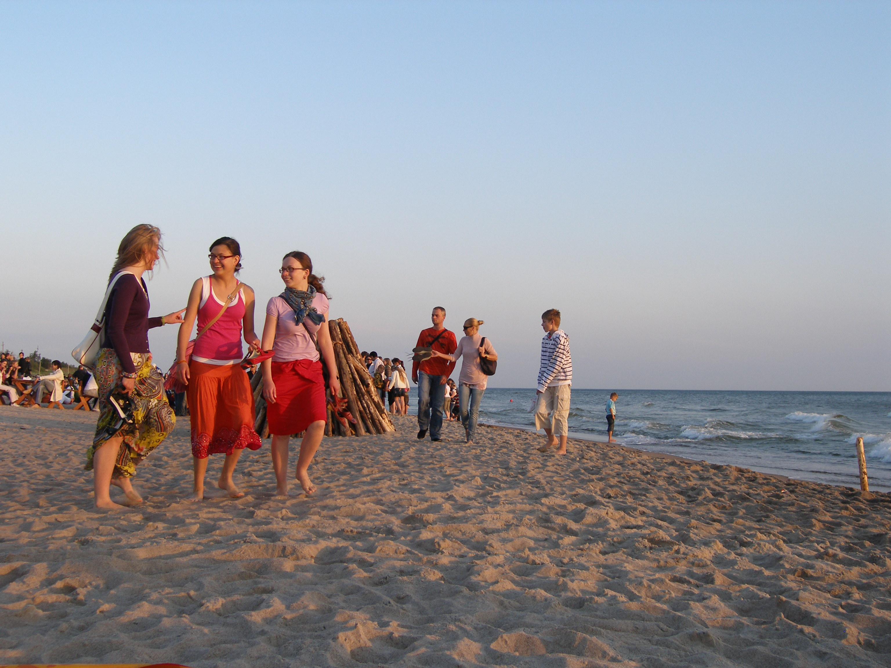 Paplūdimys Giruliuose